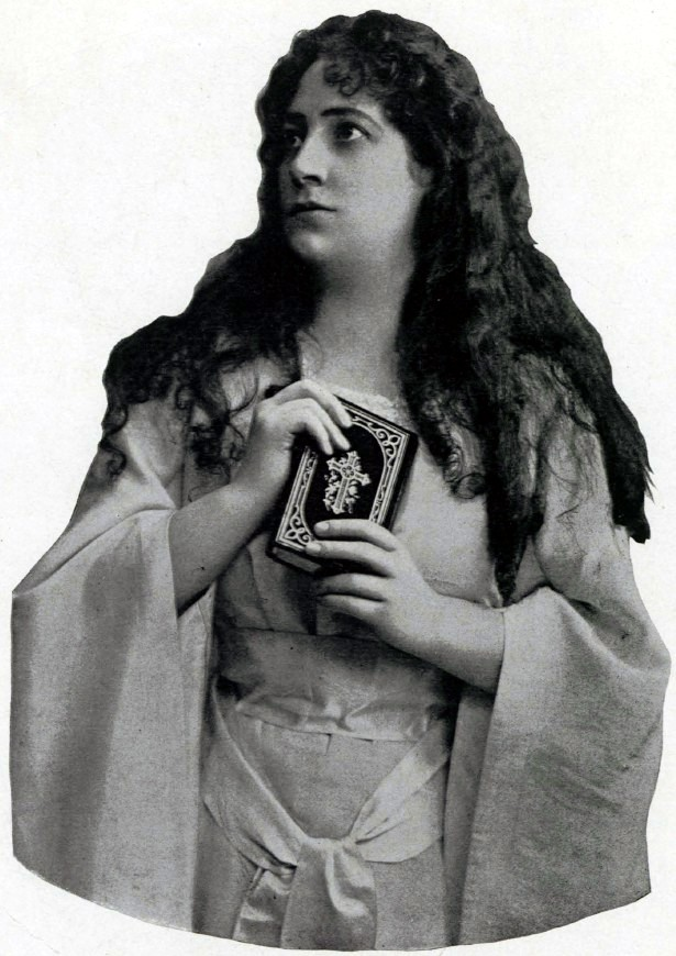 Sängerin Therese Rothauser als Mignon in der gleichnamigen Oper von Ambroise Thomas m Königlichen Opernhaus Berlin.